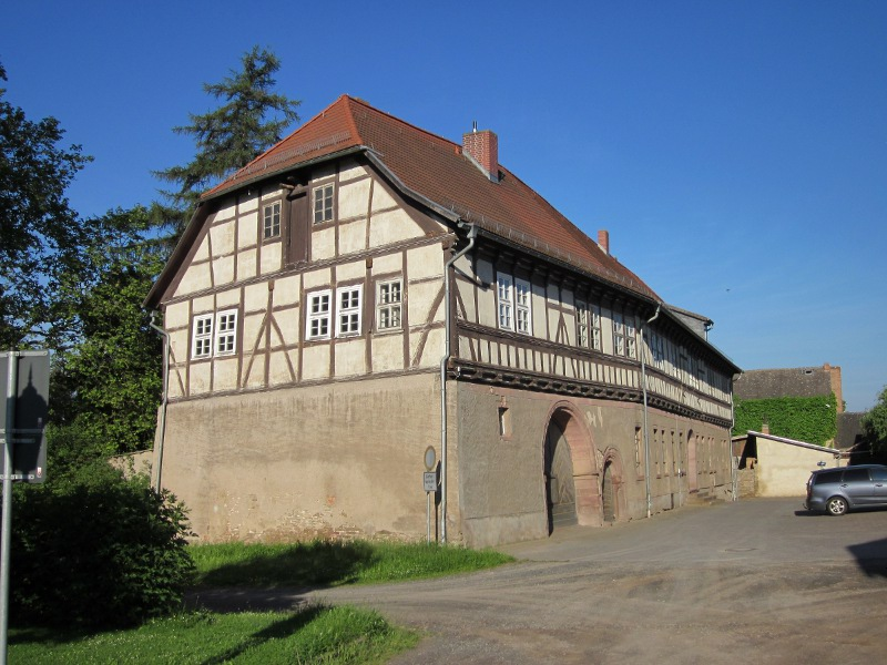 Ehemaliges Rentamt - ursprünglich Bestandteil der Schlossanlage